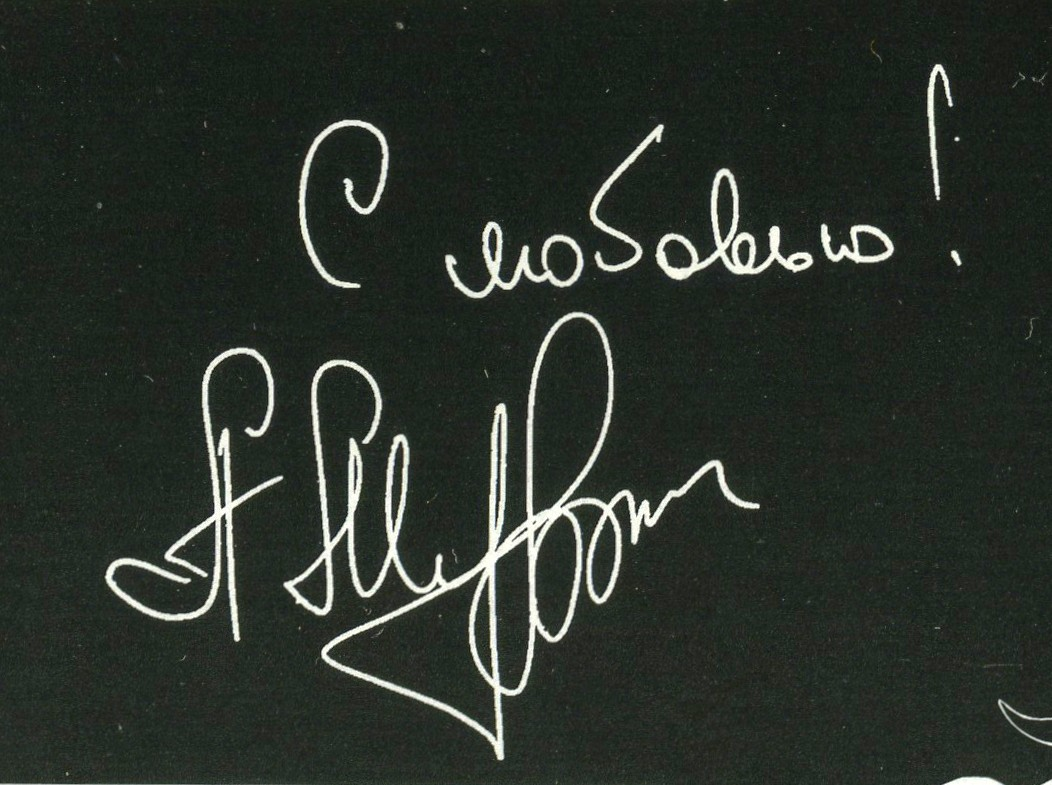 автограф певца Александра Малинина